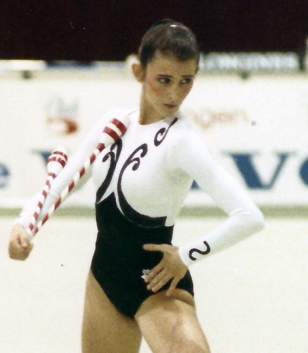 Mari Carmen Nito Moreno en el Mundial de Gimnasia Rítmica en Sarajevo (1989).